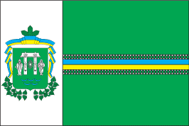 Прапор Вижницького району